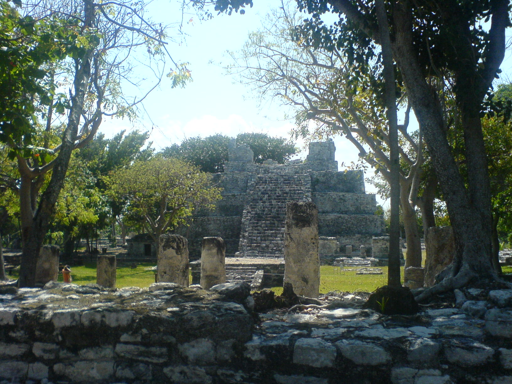 "El Castillo",Zona Arquológica El Meco.